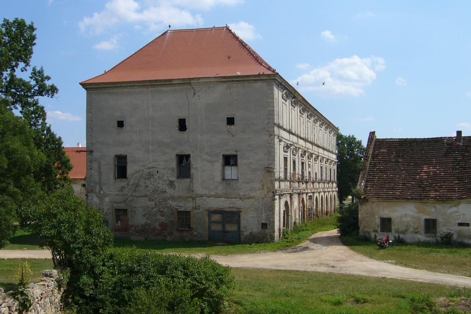 Kestřany – severní průčelí zámku